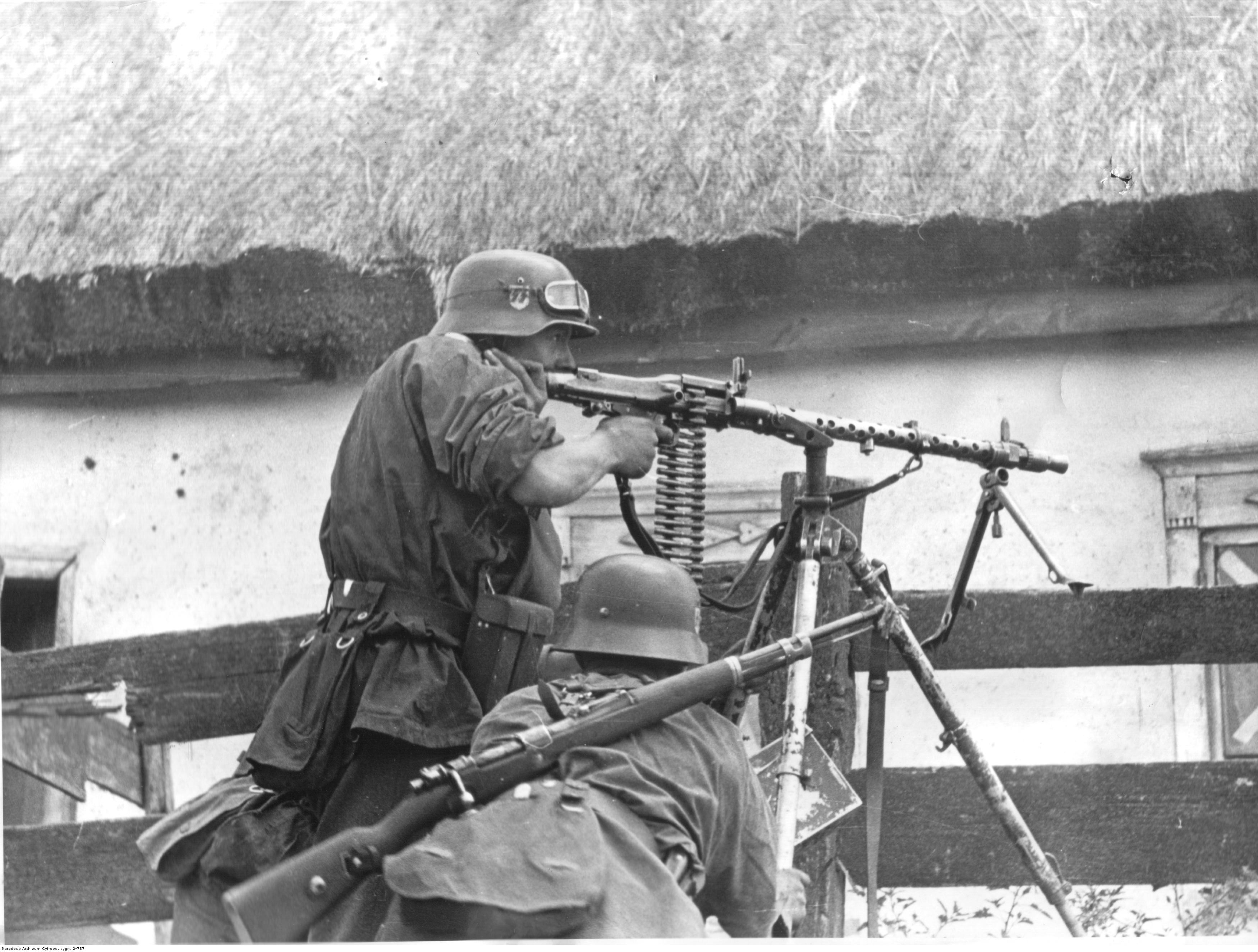 Stanowisko karabinu maszynowego MG 34 na podstawie trójnożnej we wsi koło Humania. Widoczni dwaj żołnierze z pułku „Germania” 5 Dywizji Pancernej SS „Wiking”. Jeden z żołnierzy uzbrojony jest w karabinek Mauser Kar98k.